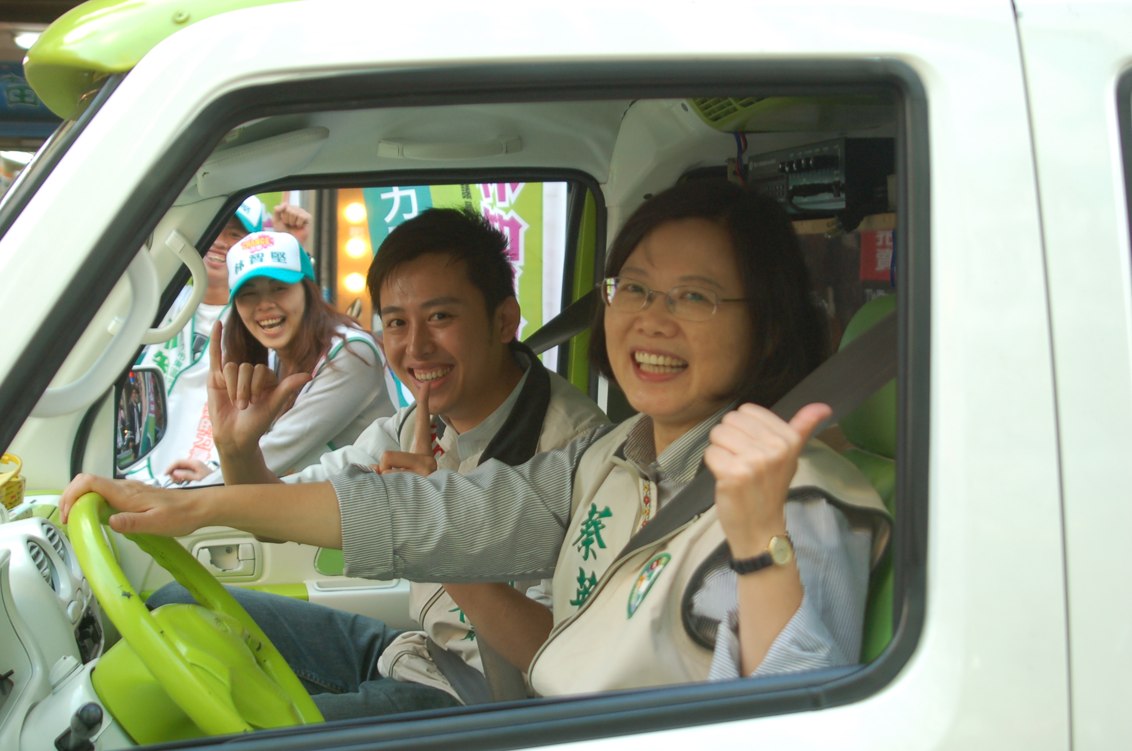 林智堅與蔡英文乘坐林智堅的中華菱利改裝胖卡